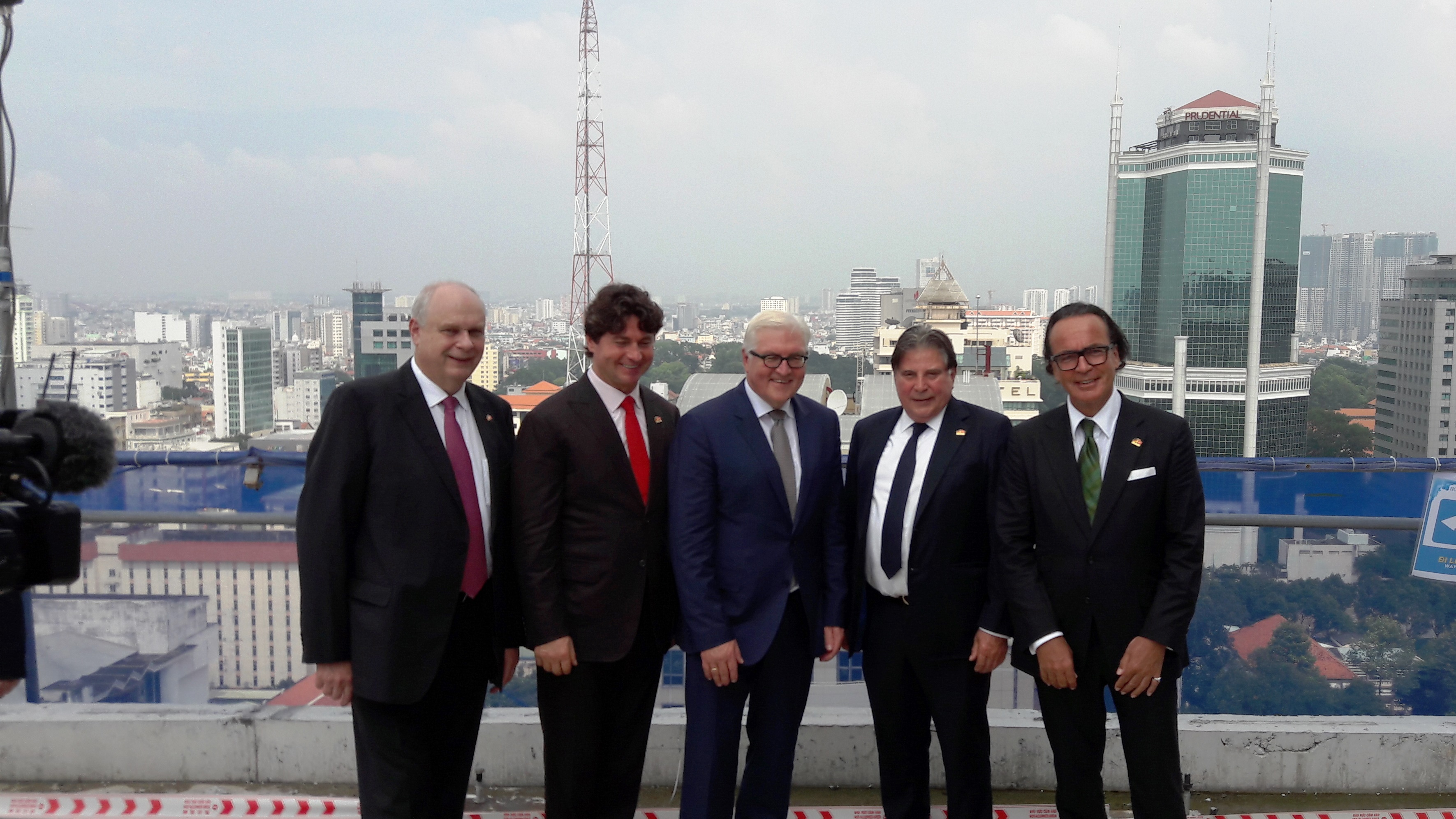 2016-11-01, Deutsches Haus HCM, Richtfest, Gruppenbild, in der Mitte Frank-Walter Steinmeier, links Horst Geicke